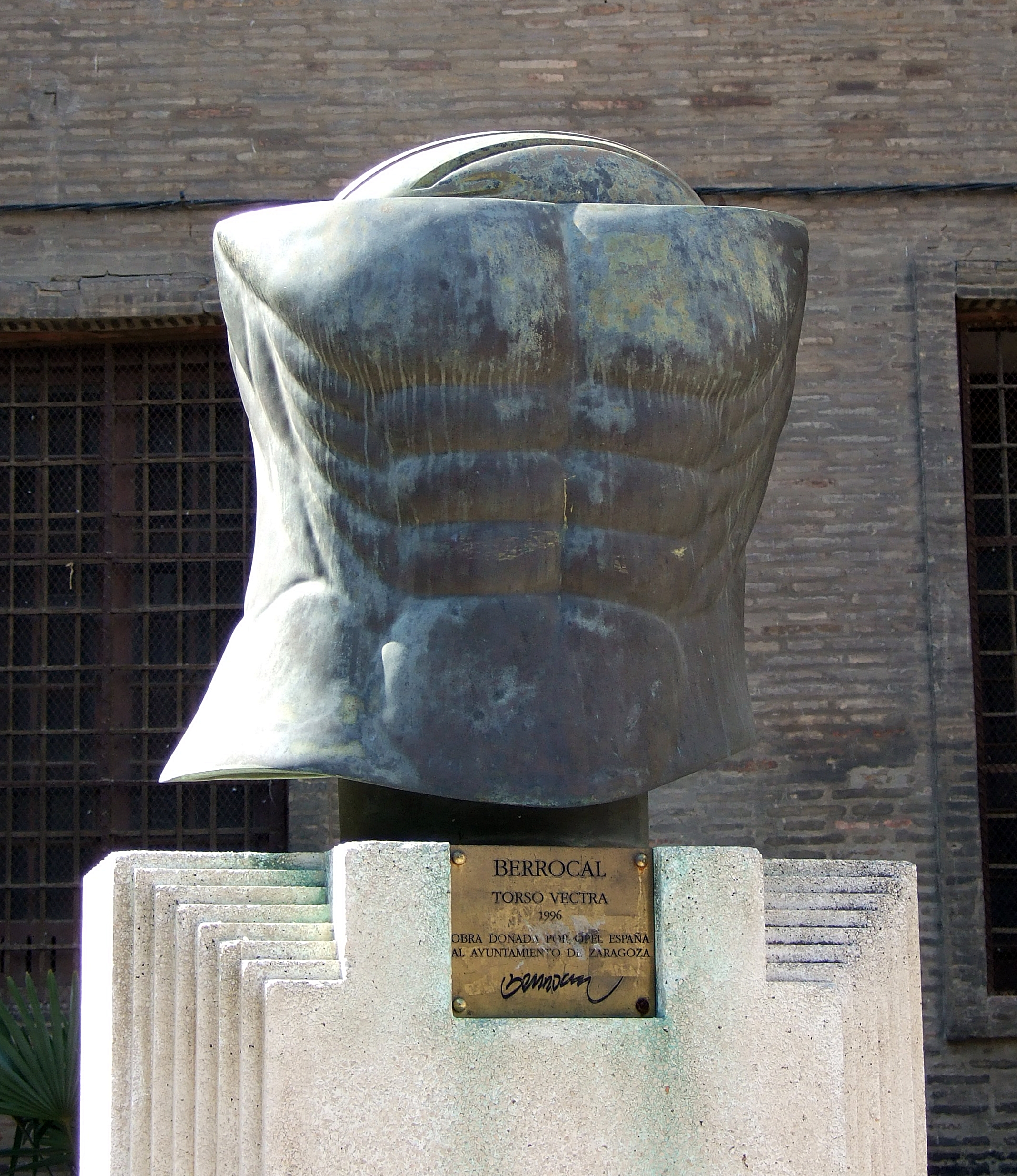 Zaragoza - Obra de Berrocal "Torso Vectra" (1996) - Obra donada por Opel España al ayuntamiento de Zaragoza